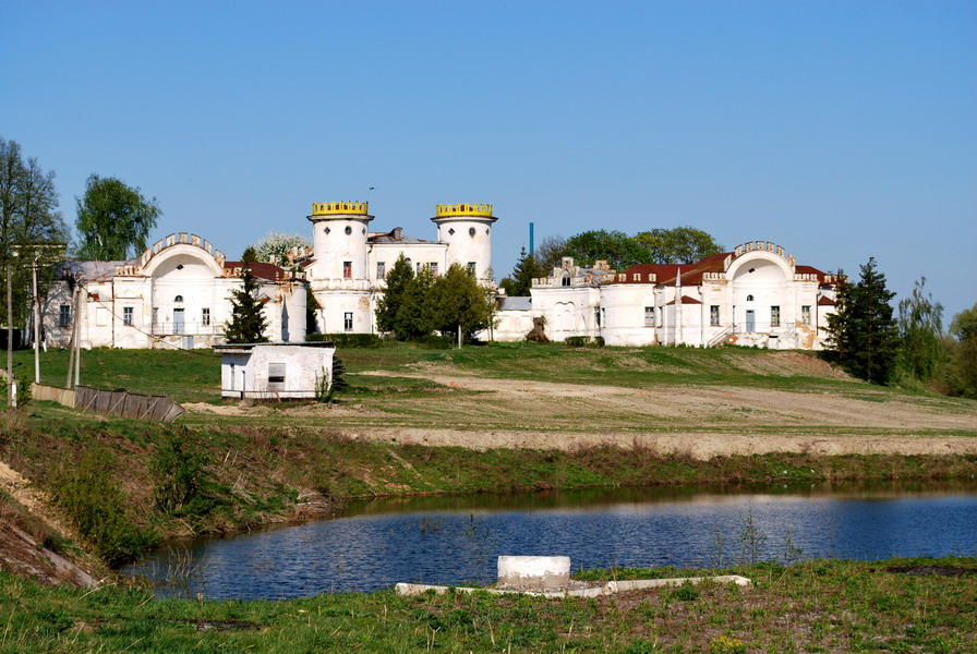 Палац Румянцева-Задунайського: Фотографія палацу Румянцева-Задунайського у с. Вишеньки Коропського району